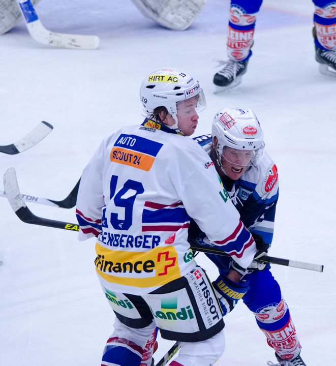 _DSC5232.jpg